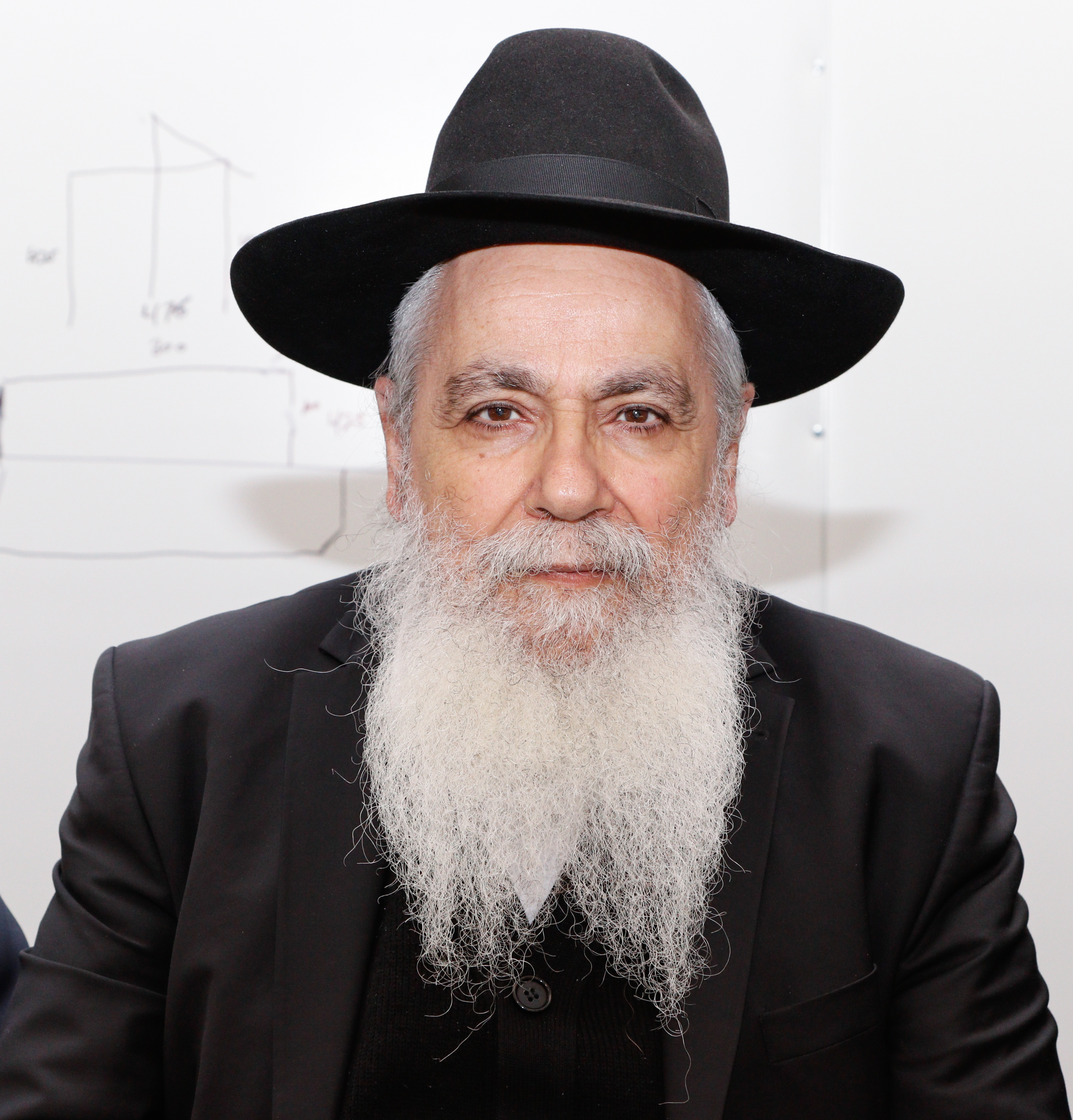 הרב יעקב ישראל לוגאסי. ינואר 2020